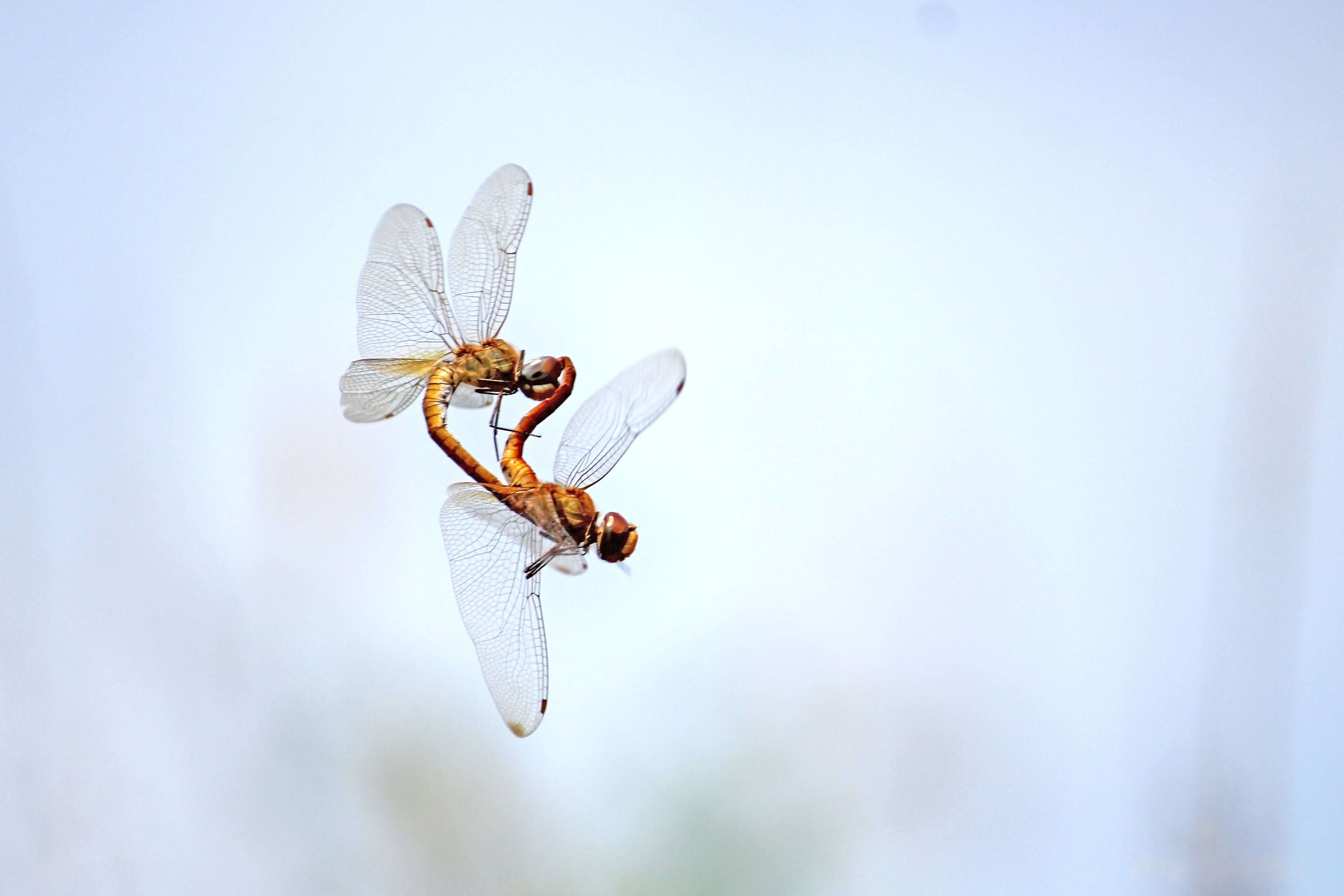 Wandering glider (Pantala flavescens) mating.